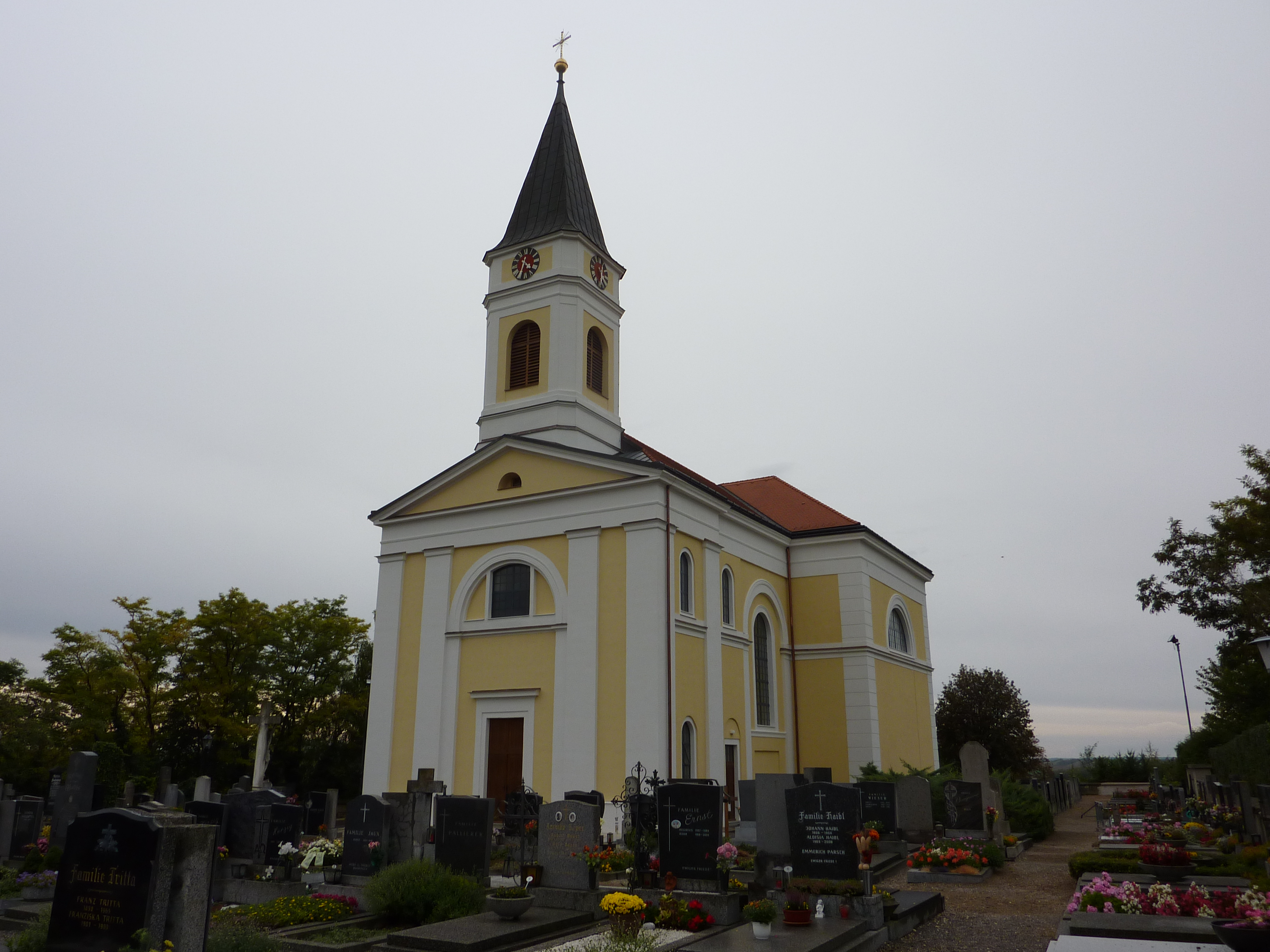 Pfarrkirche Kammersdorf, Nappersdorf-Kammersdorf, Niederösterreich